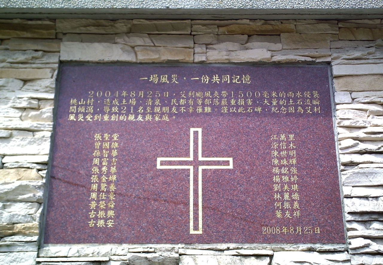 2004年艾利颱風罹難紀念碑碑文，位於臺灣新竹縣五峰鄉